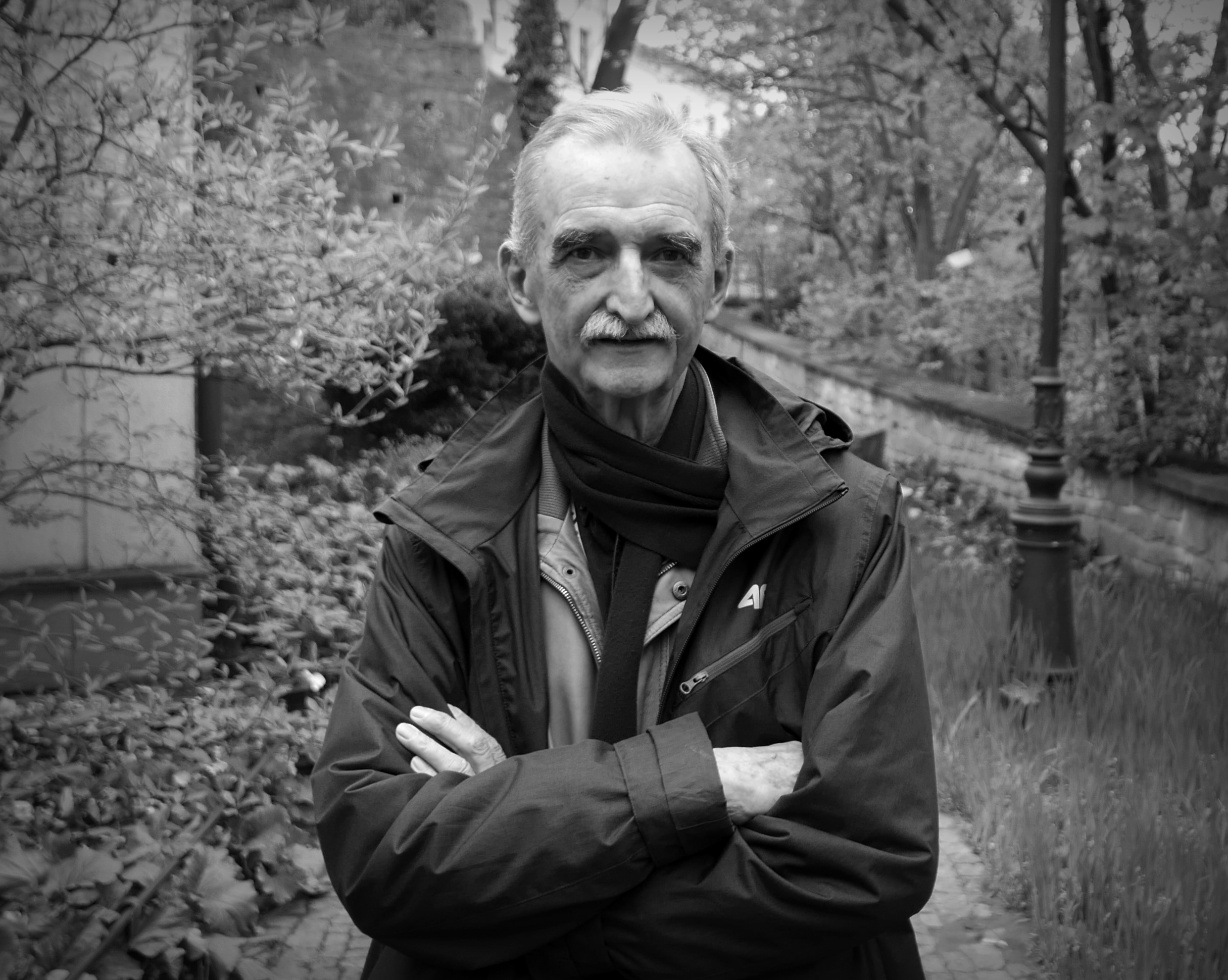 Marek Koterski (ur. 1942) – polski reżyser filmowy i teatralny, scenarzysta, aktor, poeta, prozaik i dramatopisarz. Na festiwalu filmowym Kino na Granicy w Cieszynie 2019